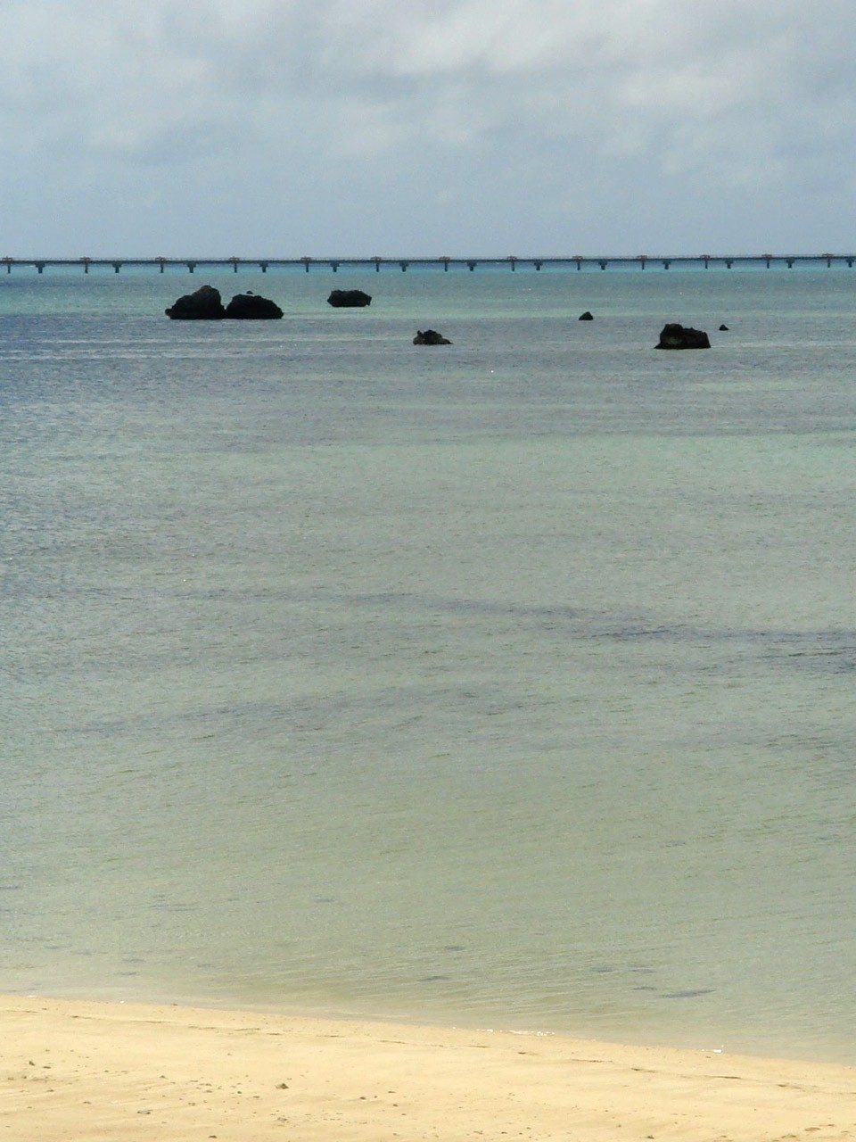 Sawada-no-hama Beach, Irabu Island, Okinawa Pref., Japan / 佐和田の浜（沖縄県伊良部島）